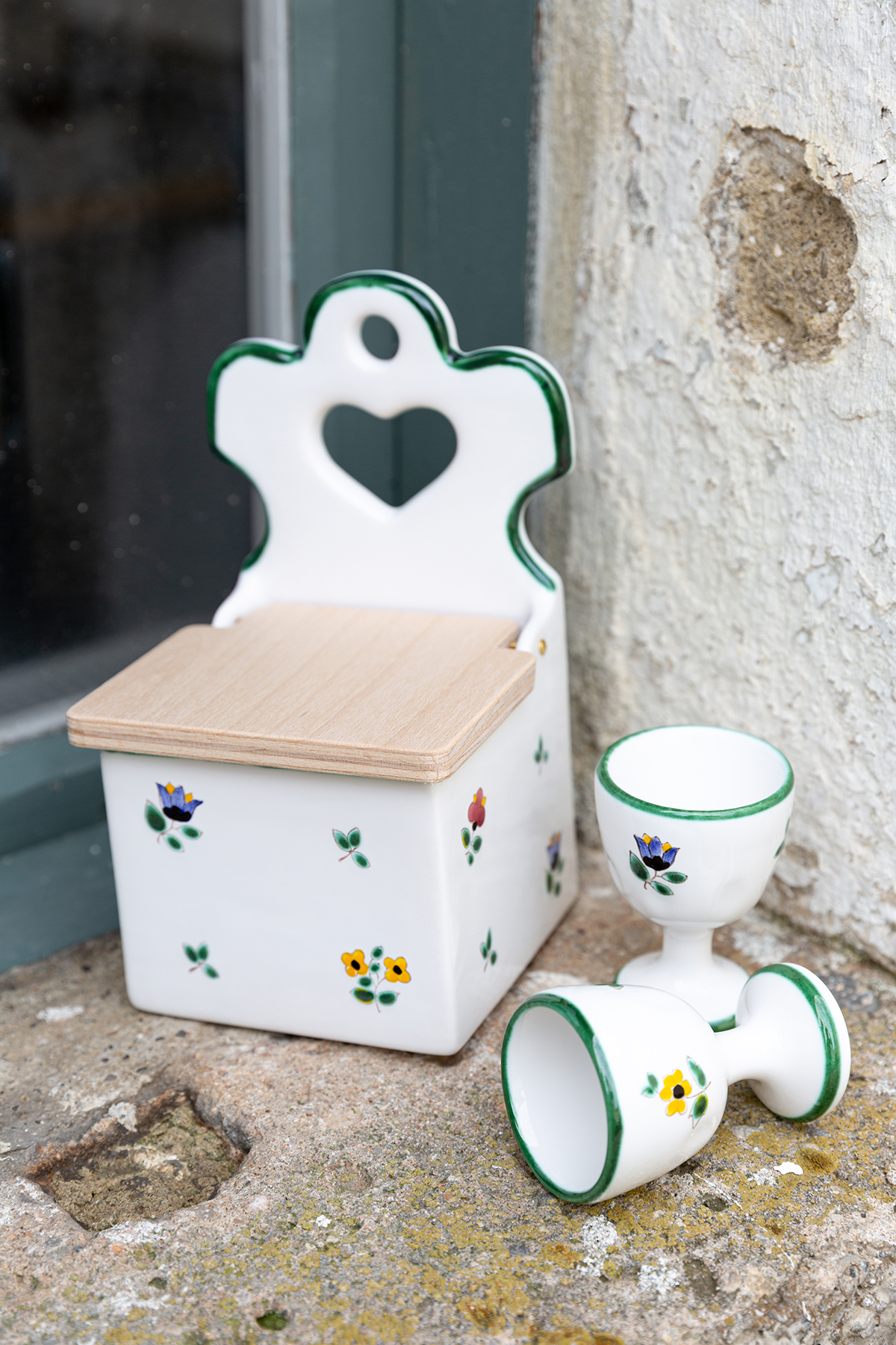 Gmundner Keramik Salzfass und Eierbecher im Design Streublumen